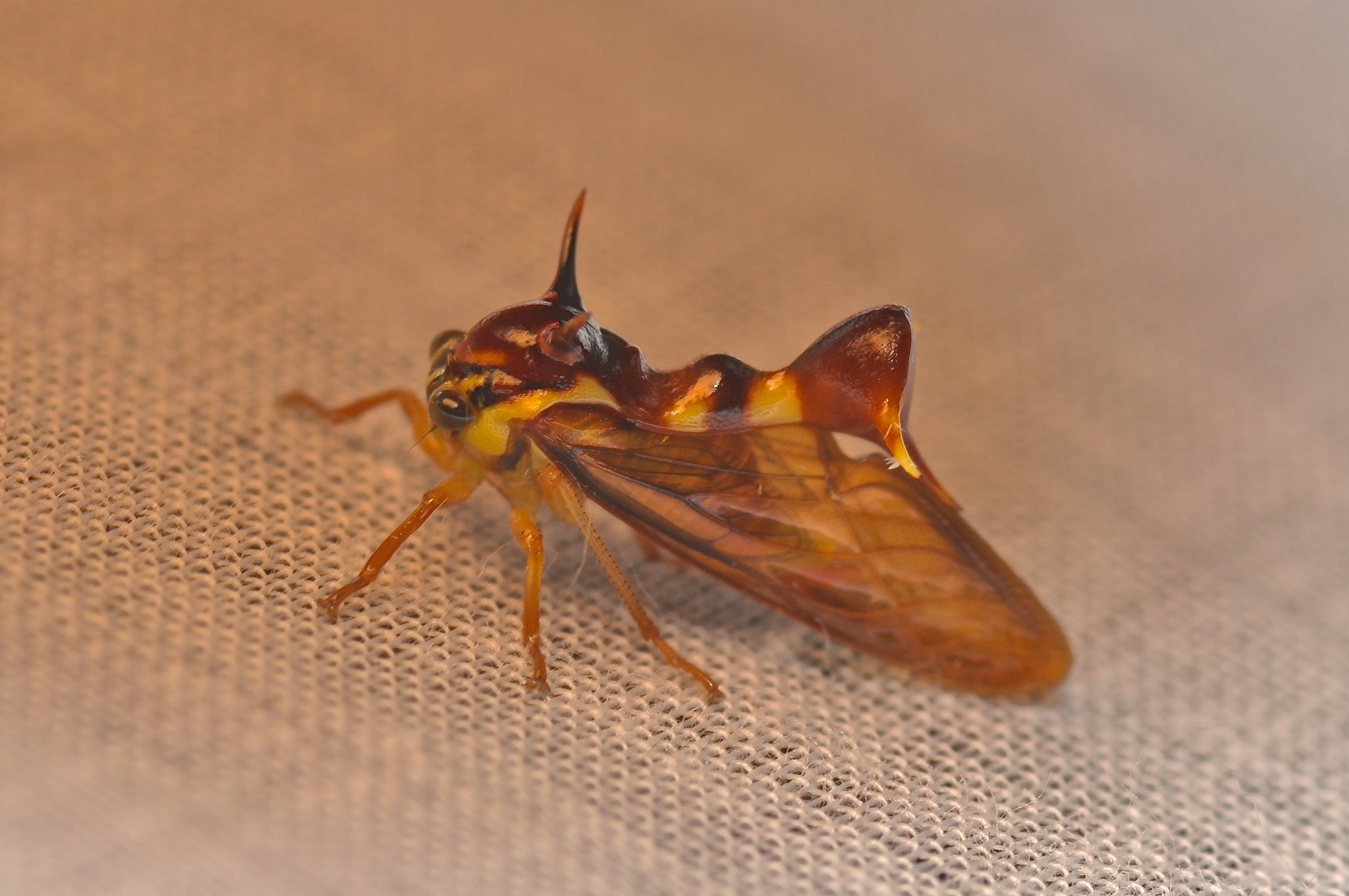 Treehopper Heteronotus sp.